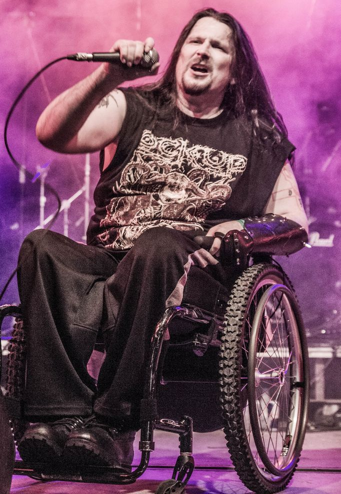 Jeff Becerra, de Possessed